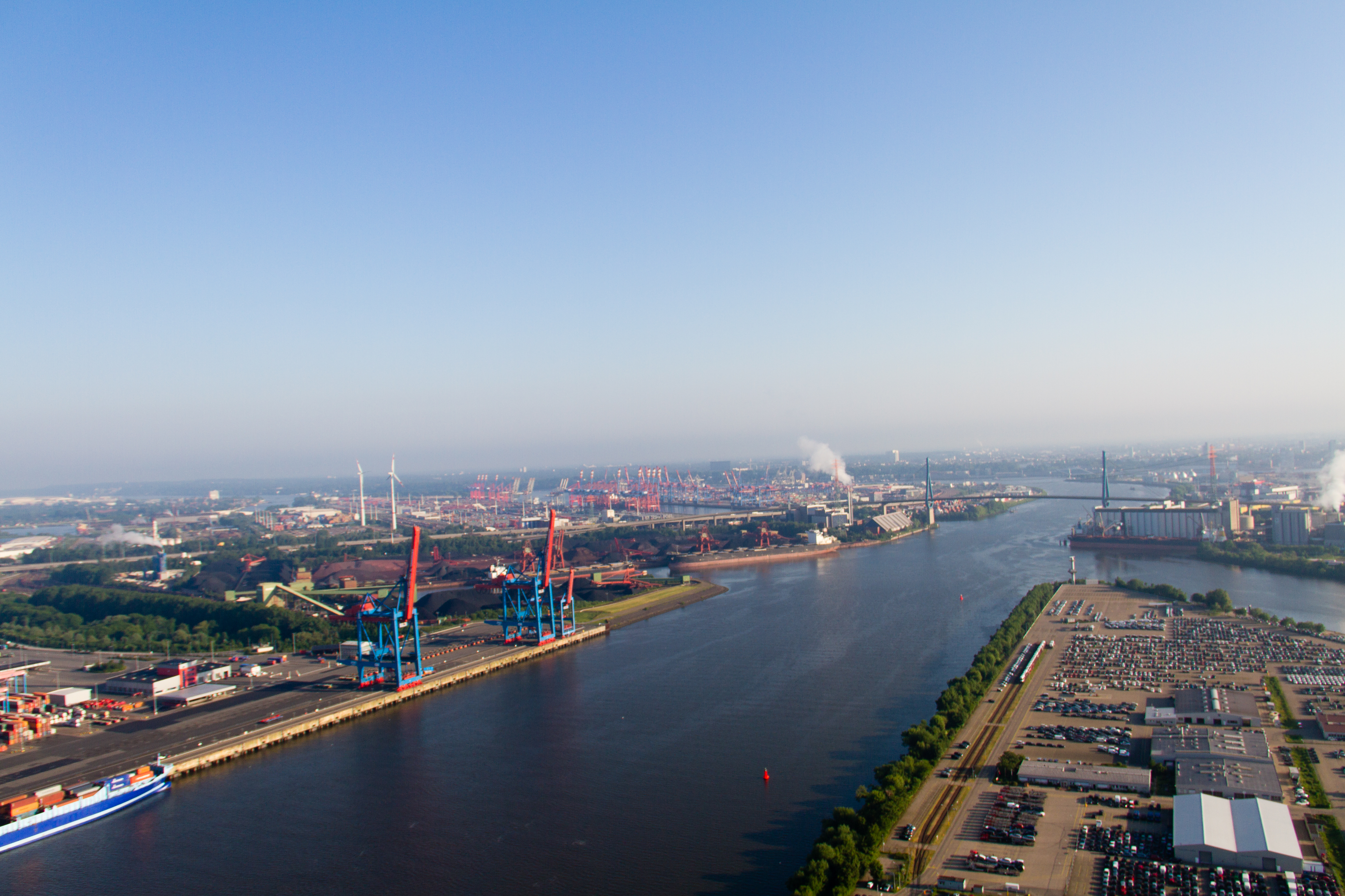 Aufnahme während des Projekts Heißluftballon